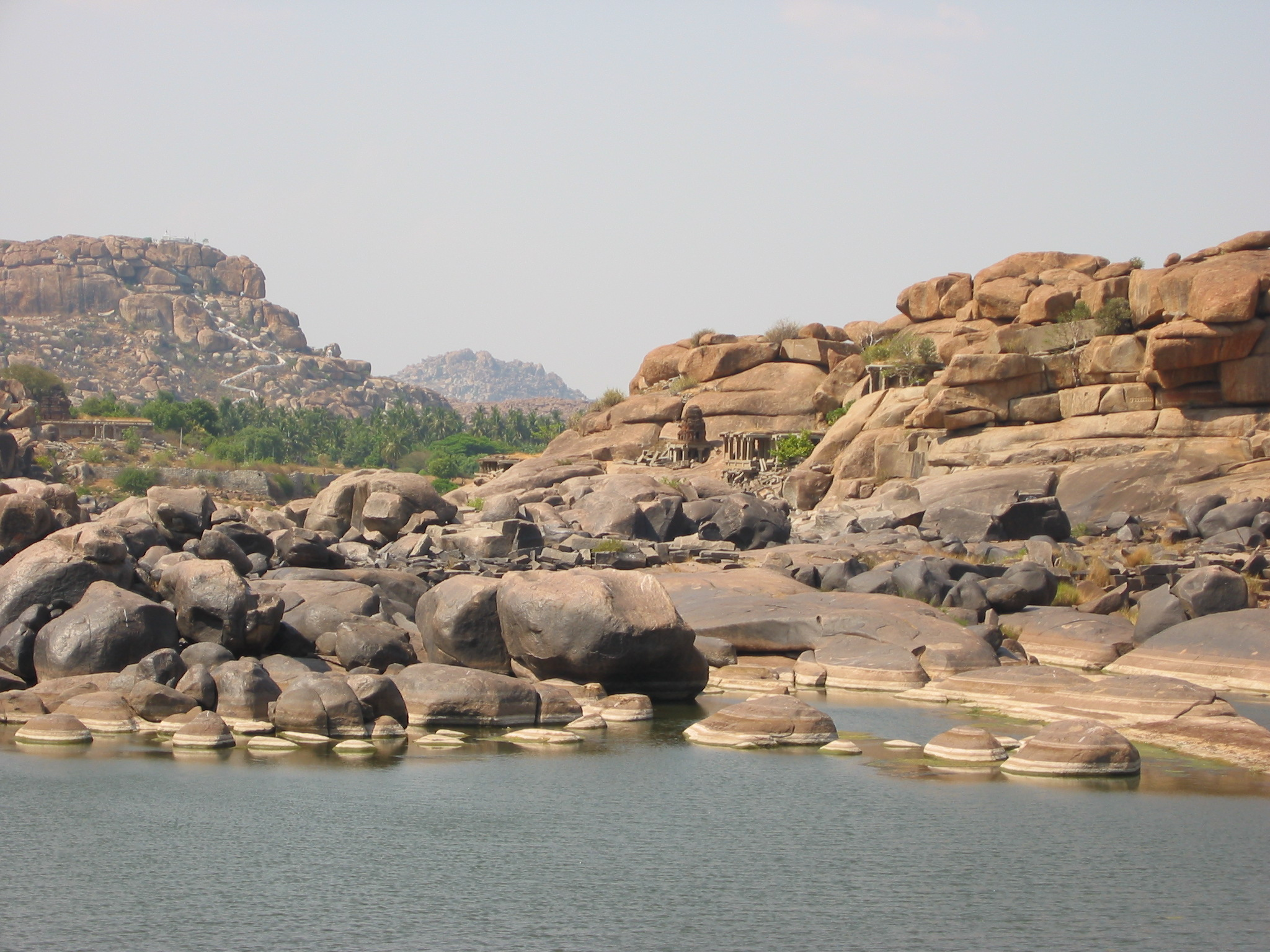 Hampi, Karnataka, Indien